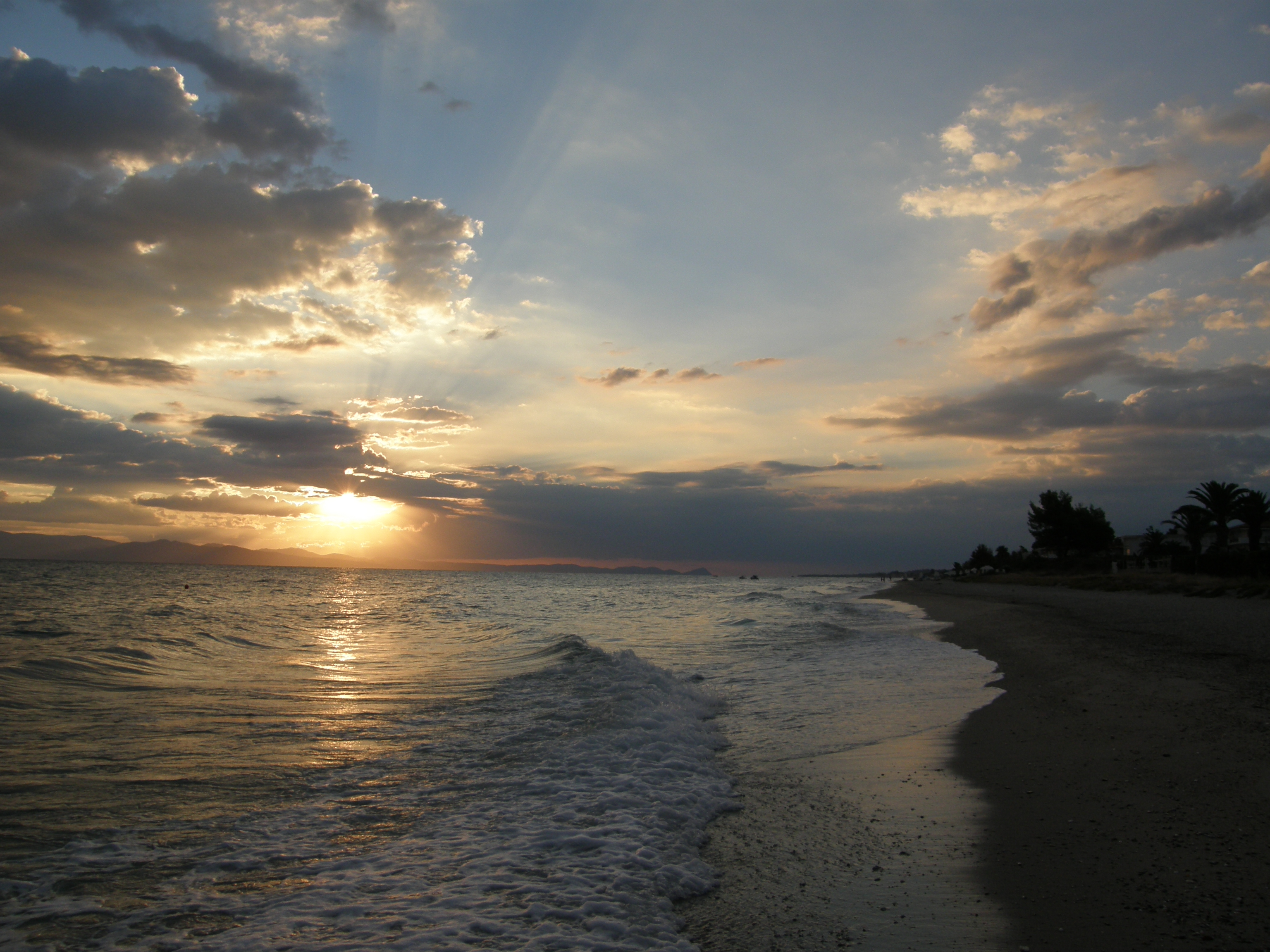 Sunrise Beach Hanioti